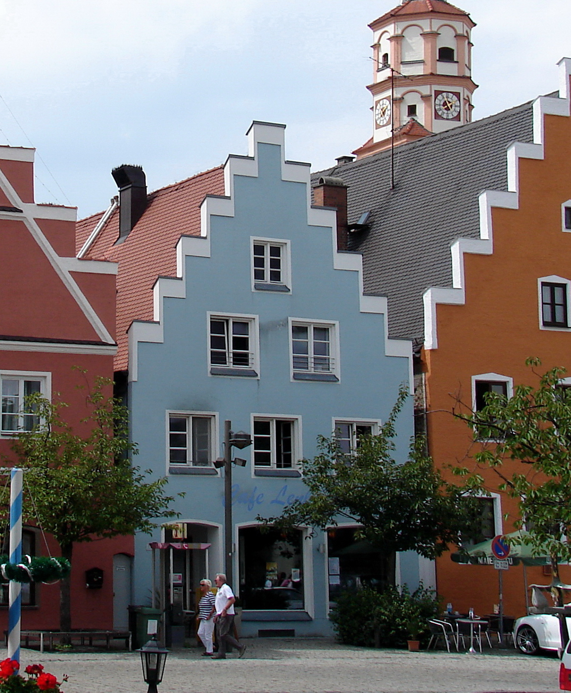 Wohn- und Geschäftshaus, östlicher Teil zweigeschossig mit Treppengiebel, Dachwerk dendrochronologisch datiert auf nach 1530.